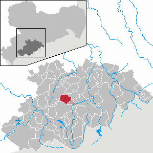 Geyer im Erzgebirgskreis, Sachsen